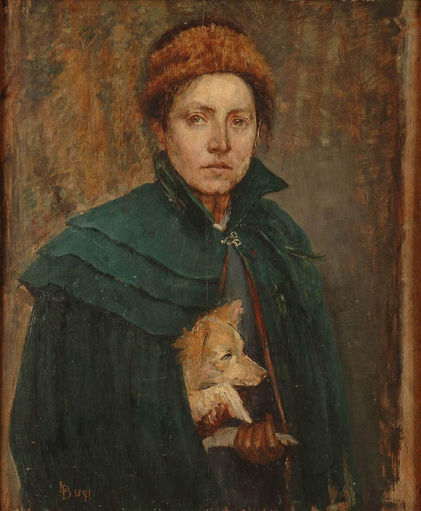 Self-portrait